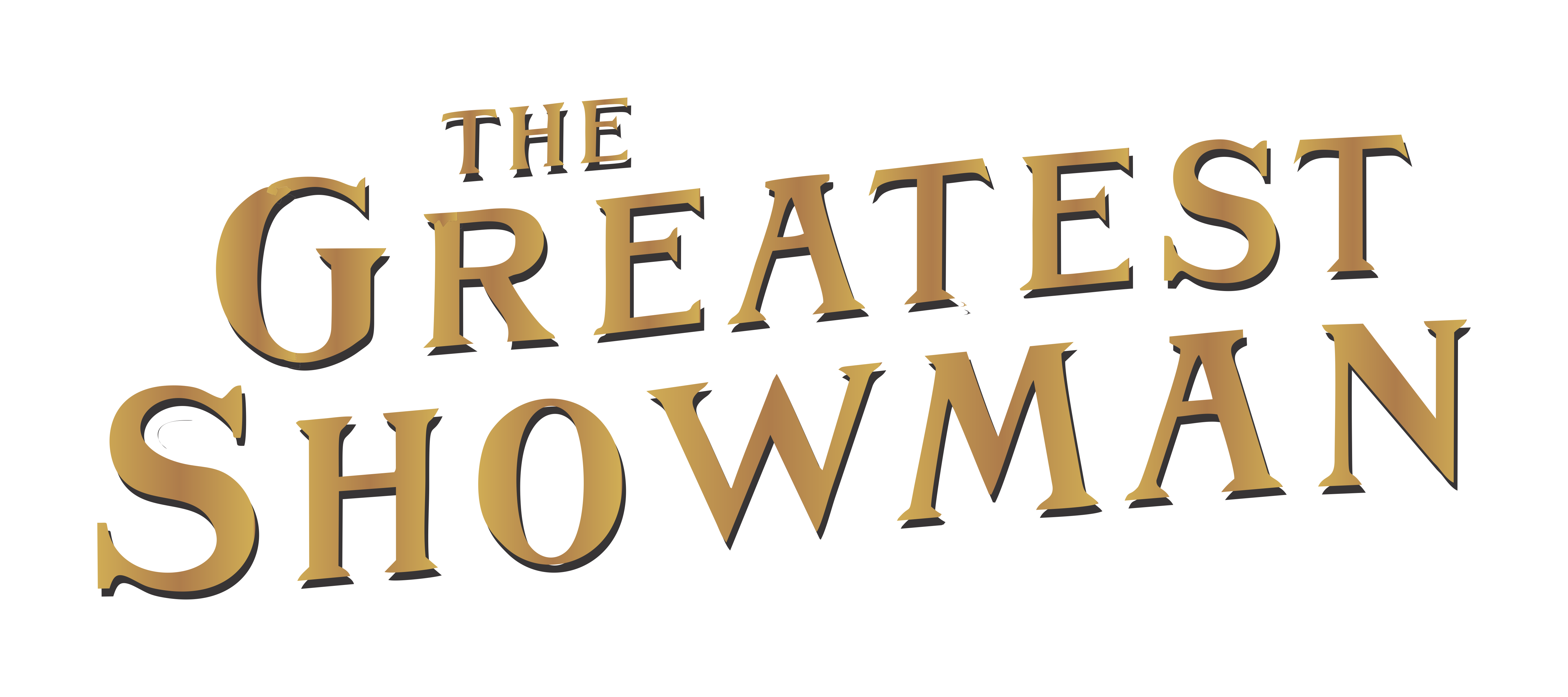 Logotipo de la cinta "The Greatest Showman" de 2017.